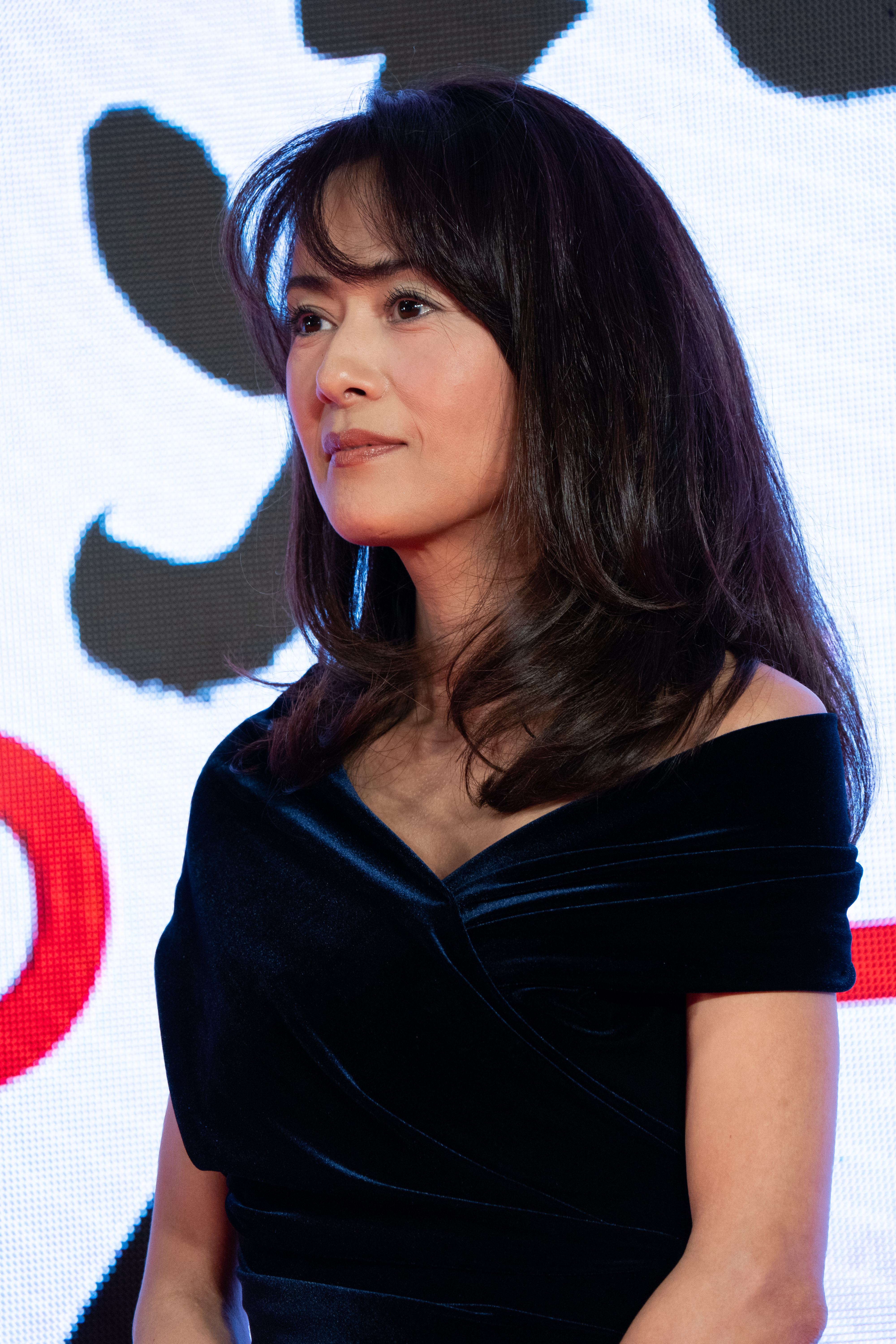 第32回 東京国際映画祭 オープニングセレモニー 後藤久美子 (男はつらいよ お帰り 寅さん)